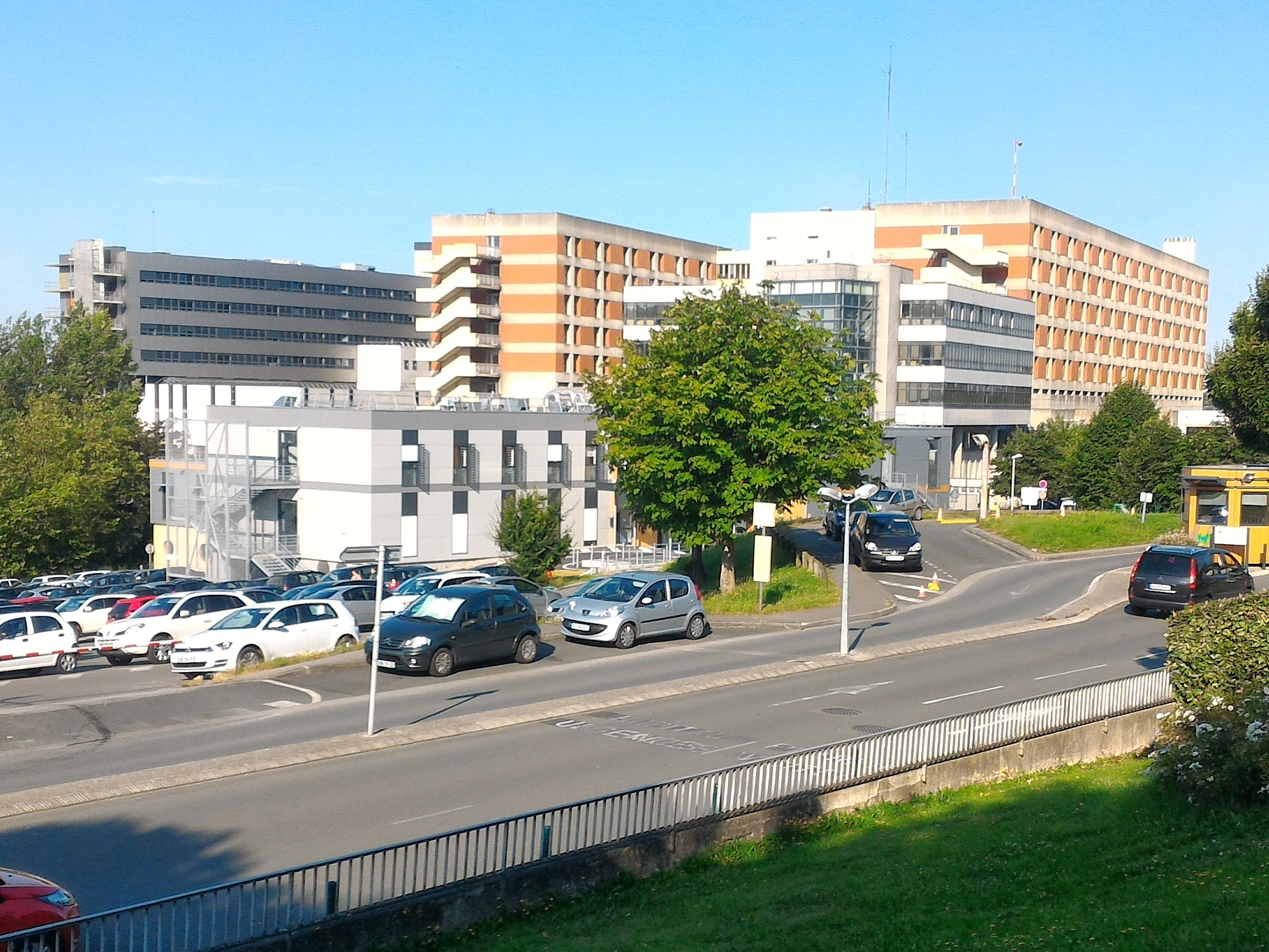 Centre hospitalier Duchenne de Boulogne-sur-Mer (Pas-de-Calais, France)